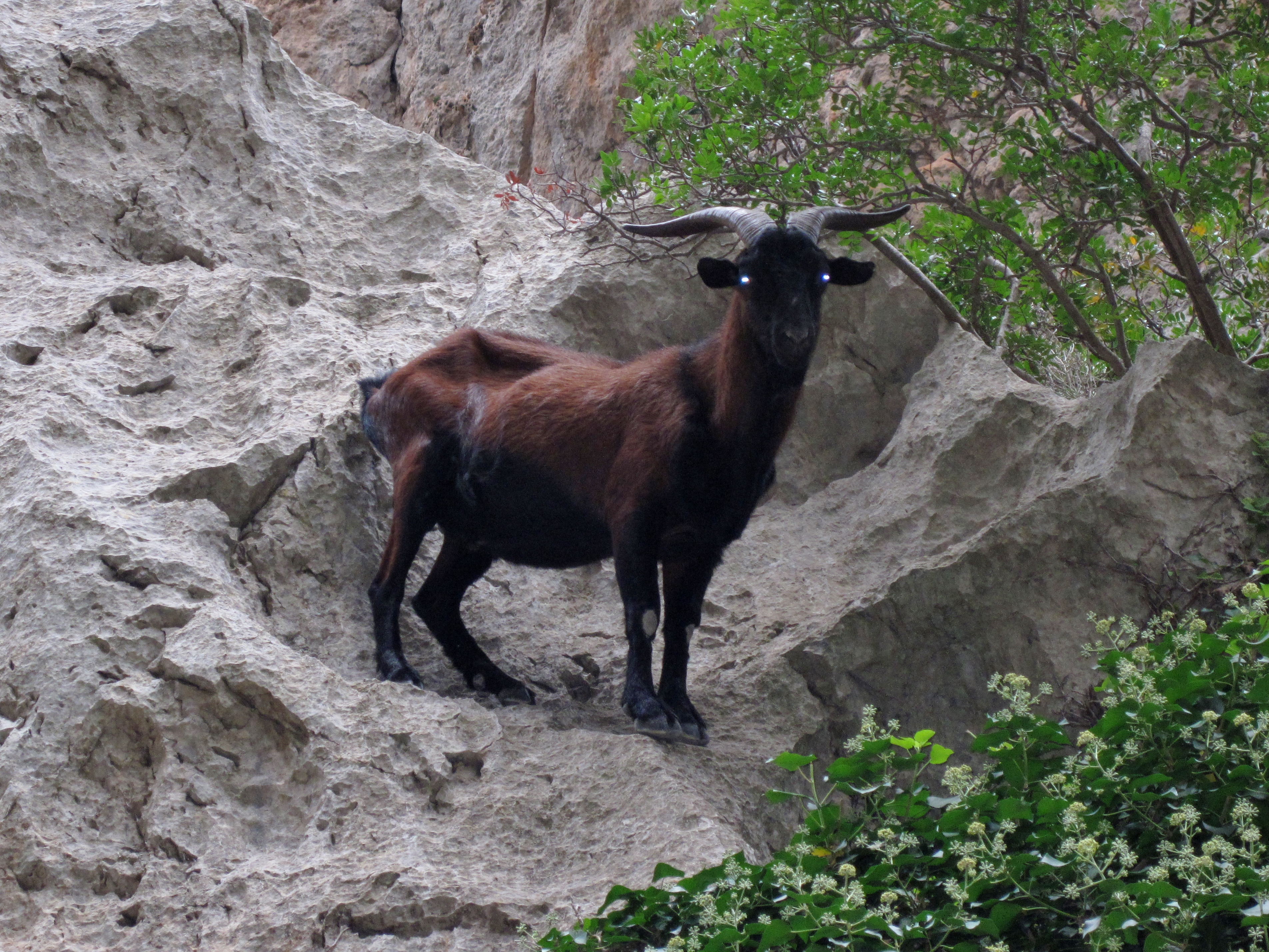 Verwilderte Hausziege (Capra aegagrus hircus) bei s’Entreforc, Bereich des Zusammenflusses der Sturzbäche Torrent de Lluc und Torrent des Gorg Blau zum Torrent de Pareis, Gemeinde Escorca, Mallorca, Spanien